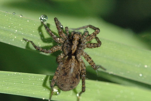 female Pardosa amentata from Commanster, Belgian High Ardennes .